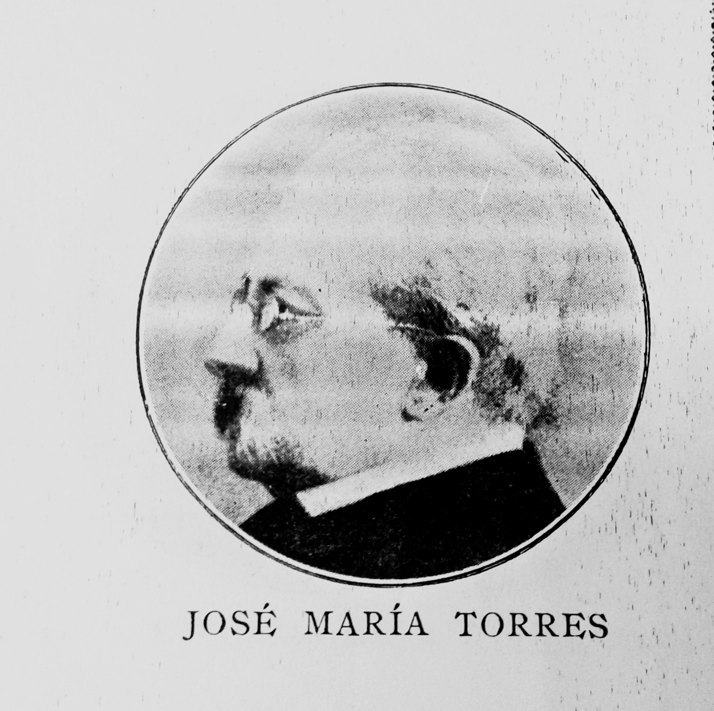 Foto de Torres que figura en el libro “Escuela Normal de Paraná. Datos históricos 1871-1895”.